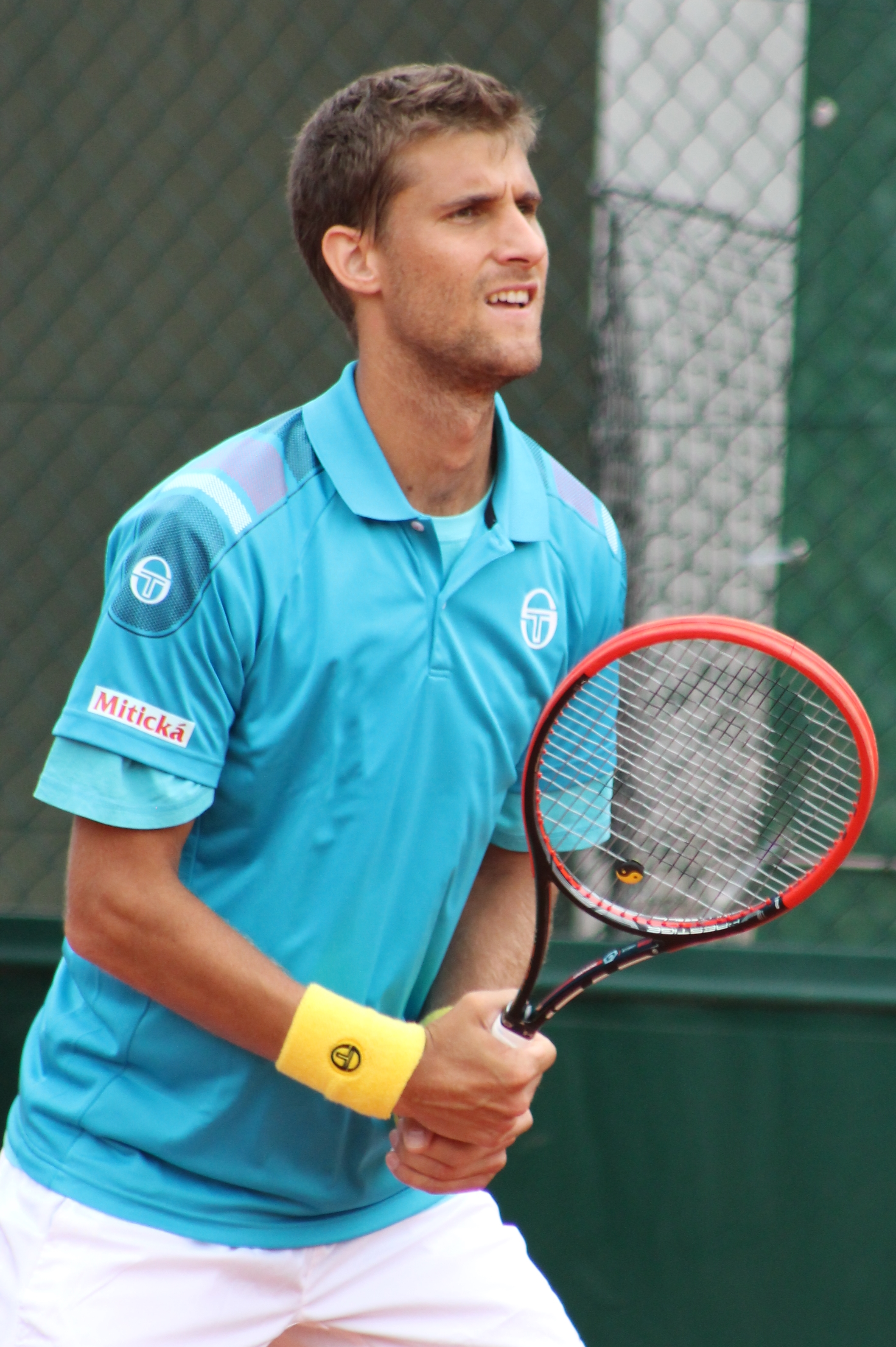 Klizan RG15 (12)